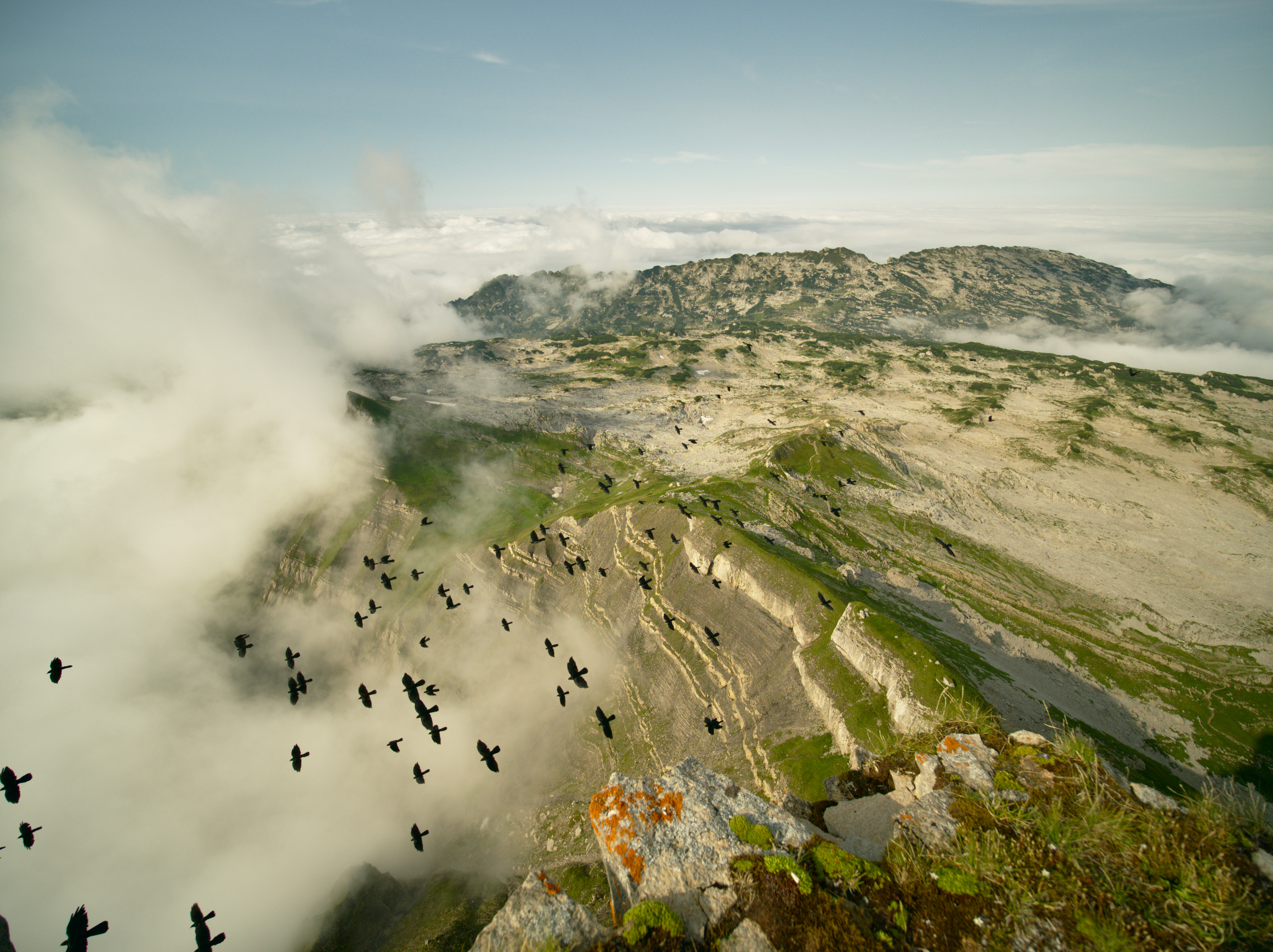 Blick auf das Gottesackerplateau vom Gipfel des Hohen Ifen Richtung Norden